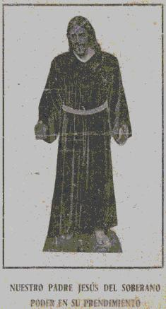 Primera foto de la talla